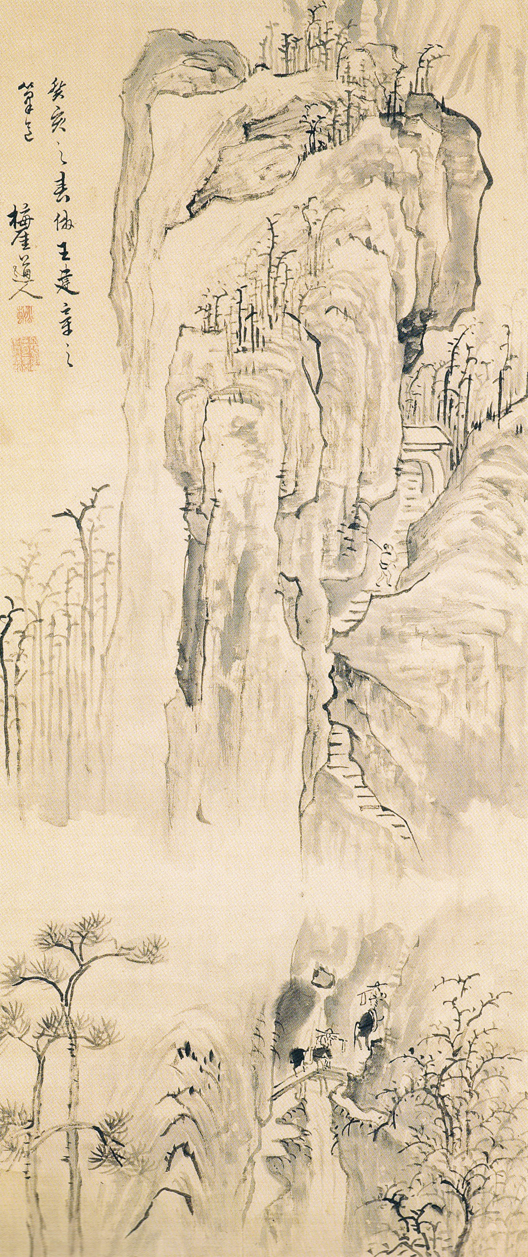 十時梅厓筆 寒村山水図 享和3年 個人蔵